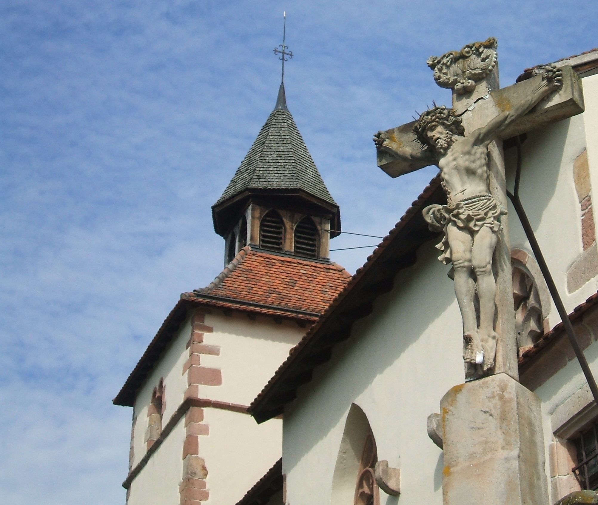 Christ en croix de 1682 (Chapelle Saint-Sébastien de Dambach-la-Ville)